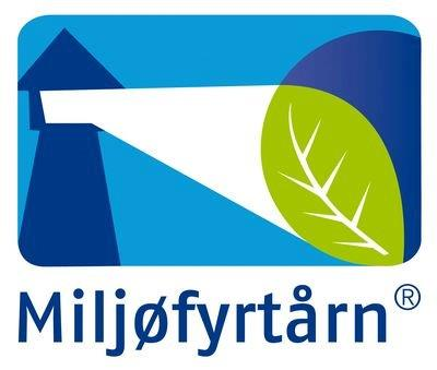 Stiftelsen Miljøfyrtårns logo